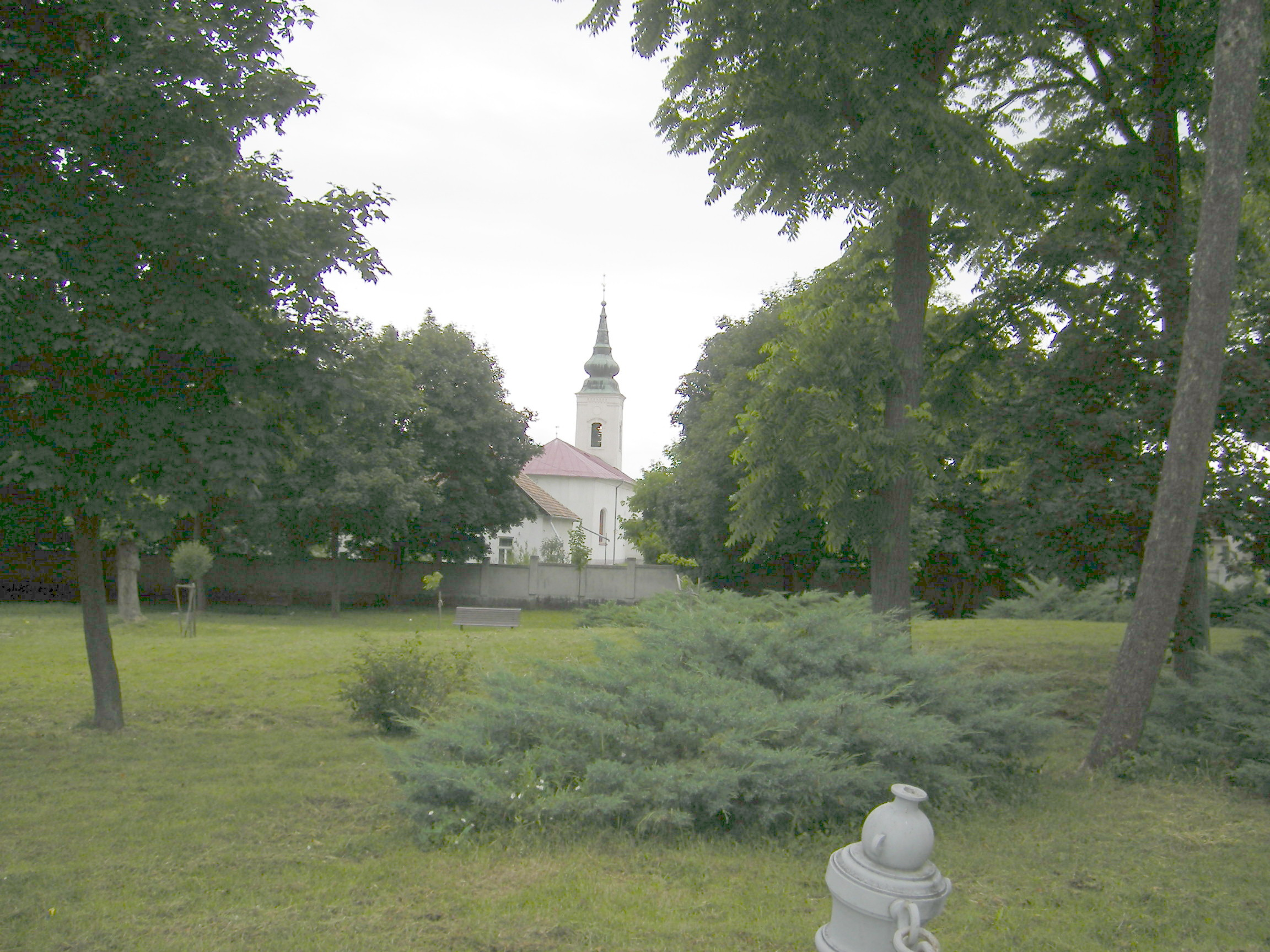 Tekovské Lužany (LV) reformated church